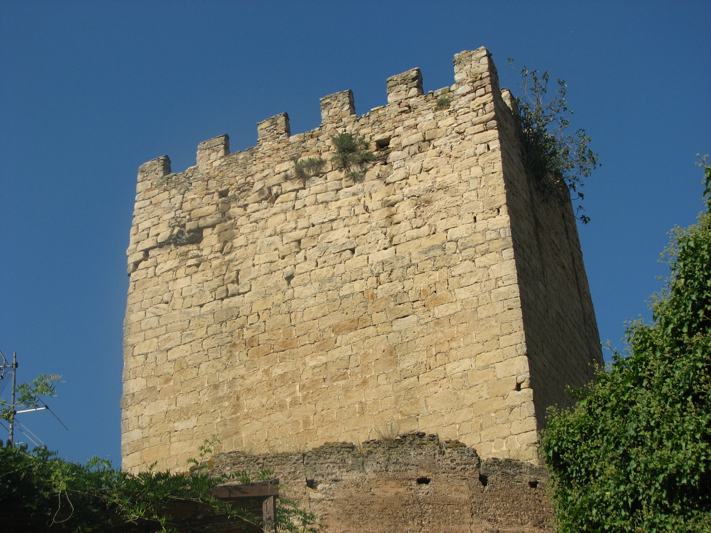 Castell de Peratallada (Forallac)